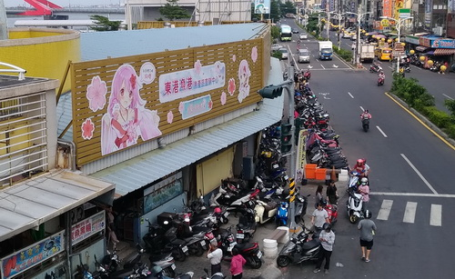 中文（台灣）: 屏東縣東港鎮，東港漁港漁產品直銷中心（華僑市場）看板娘絢櫻。